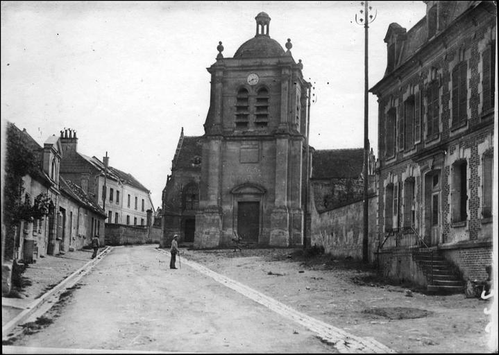 Base Mistral Mémoire - quartier de l'église - Tracy-le-Mont (Oise)